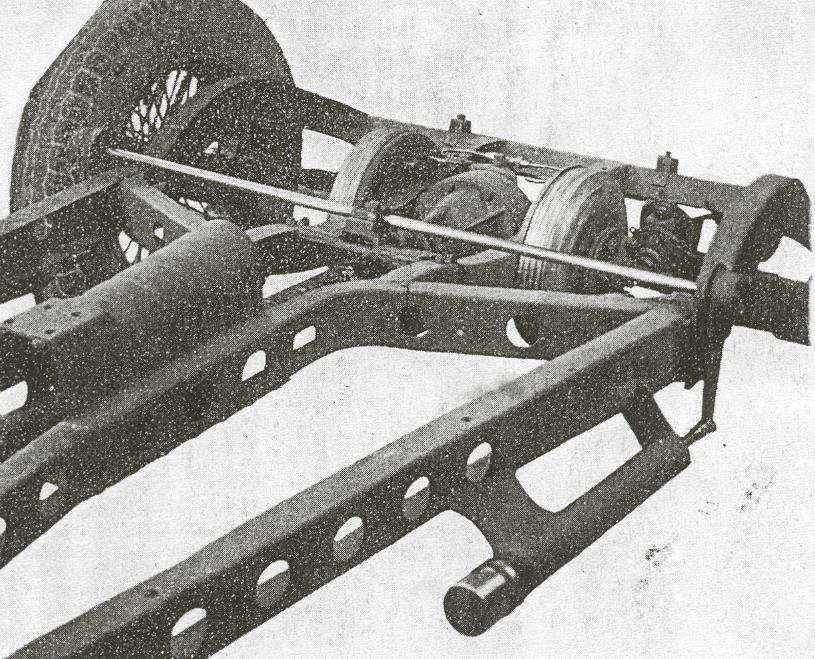 Suspension of first Bandini car Forlì Italy 1946 Tratta da Libro: Bandini (storia della vita e automobili di Ilario Bandini)